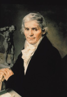 sochař Josef Malínský - portrét od Antonína Machka